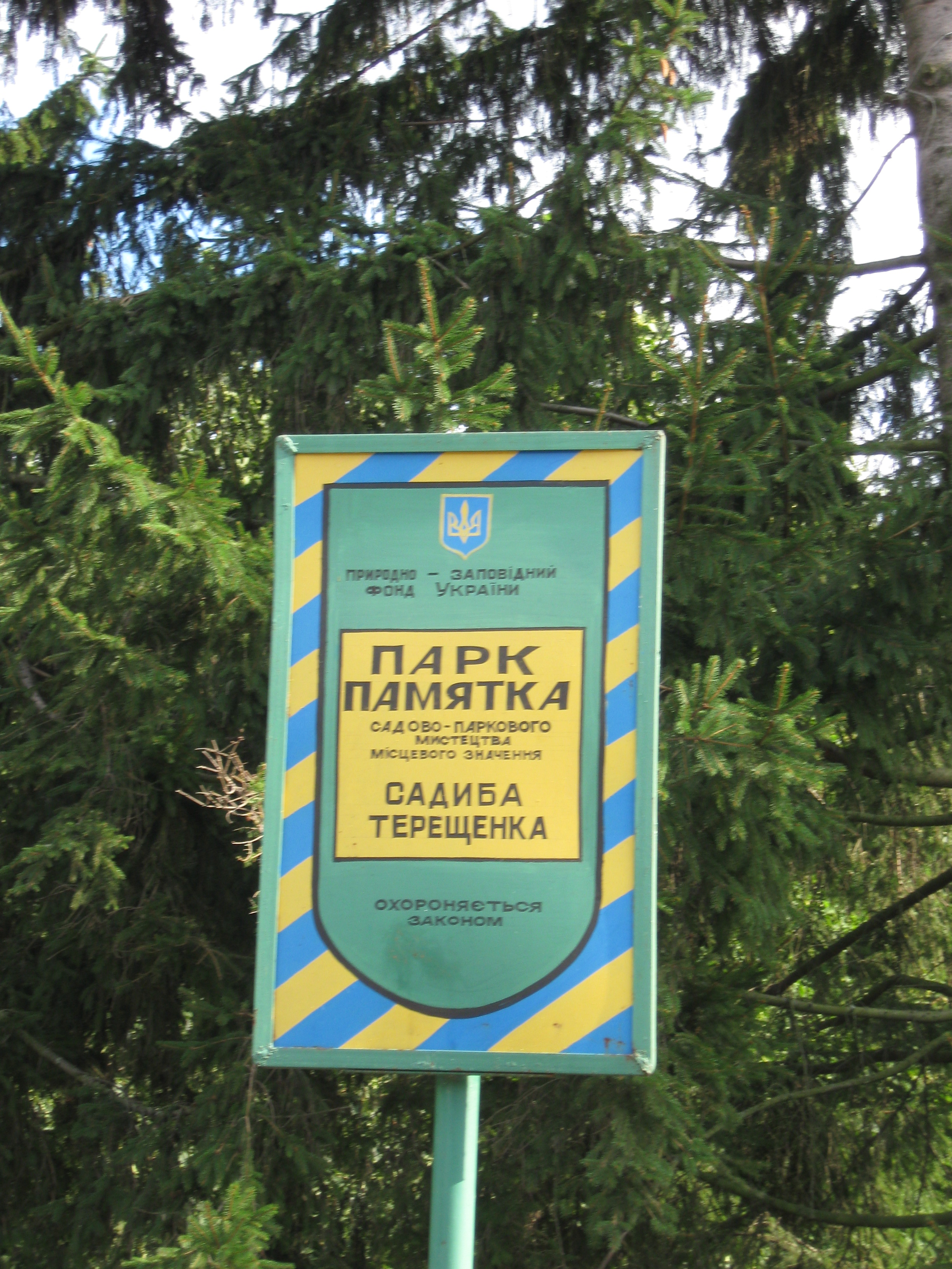 Стенд_у_Андрушівському_парку.jpg: Інфостенд в Андрушівському парку в місті Андрушівці (райцентр Житомирської області), серпень 2010 року